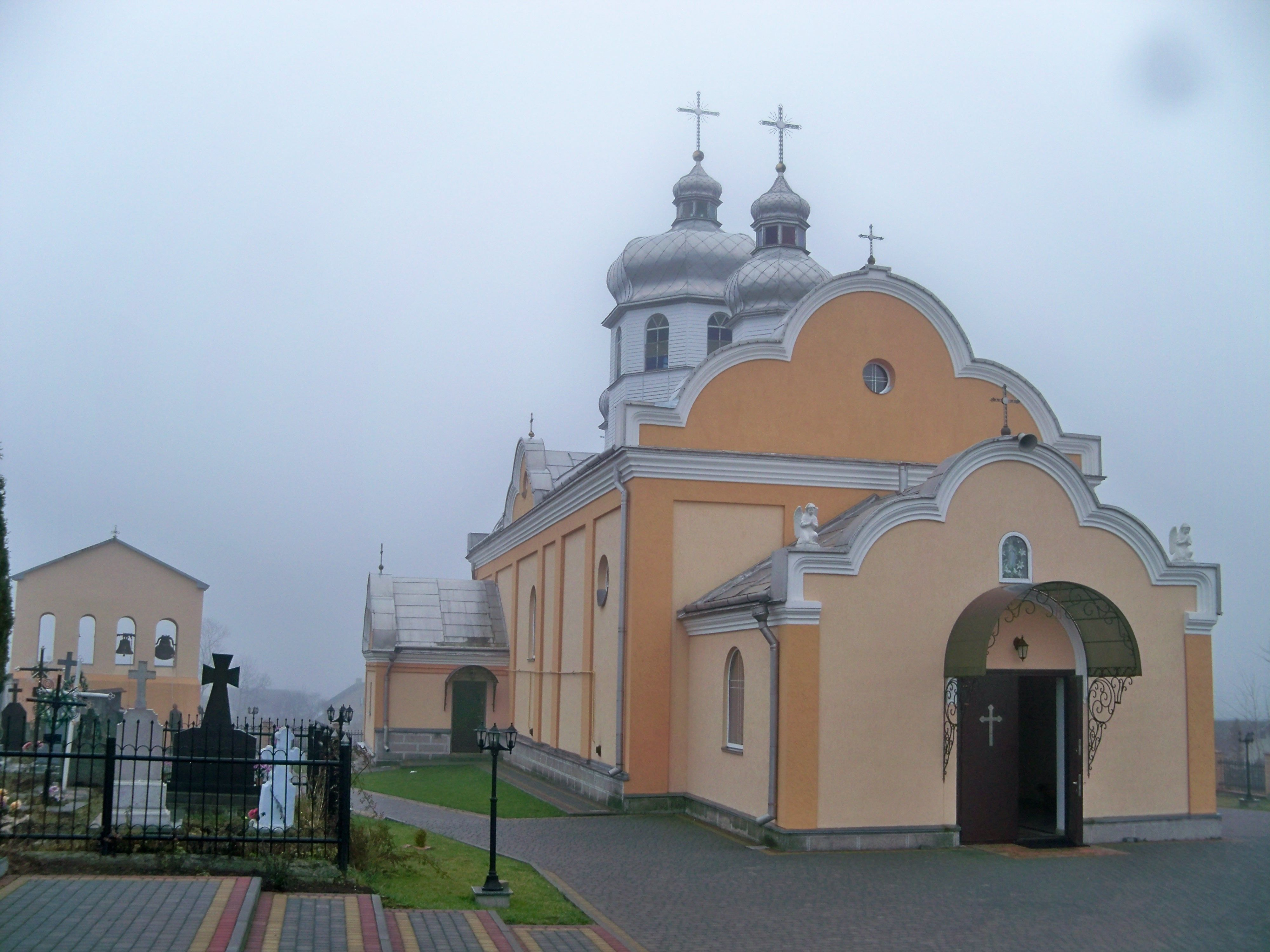 Церква Св. Дмитрія (дер.), Ремезівці